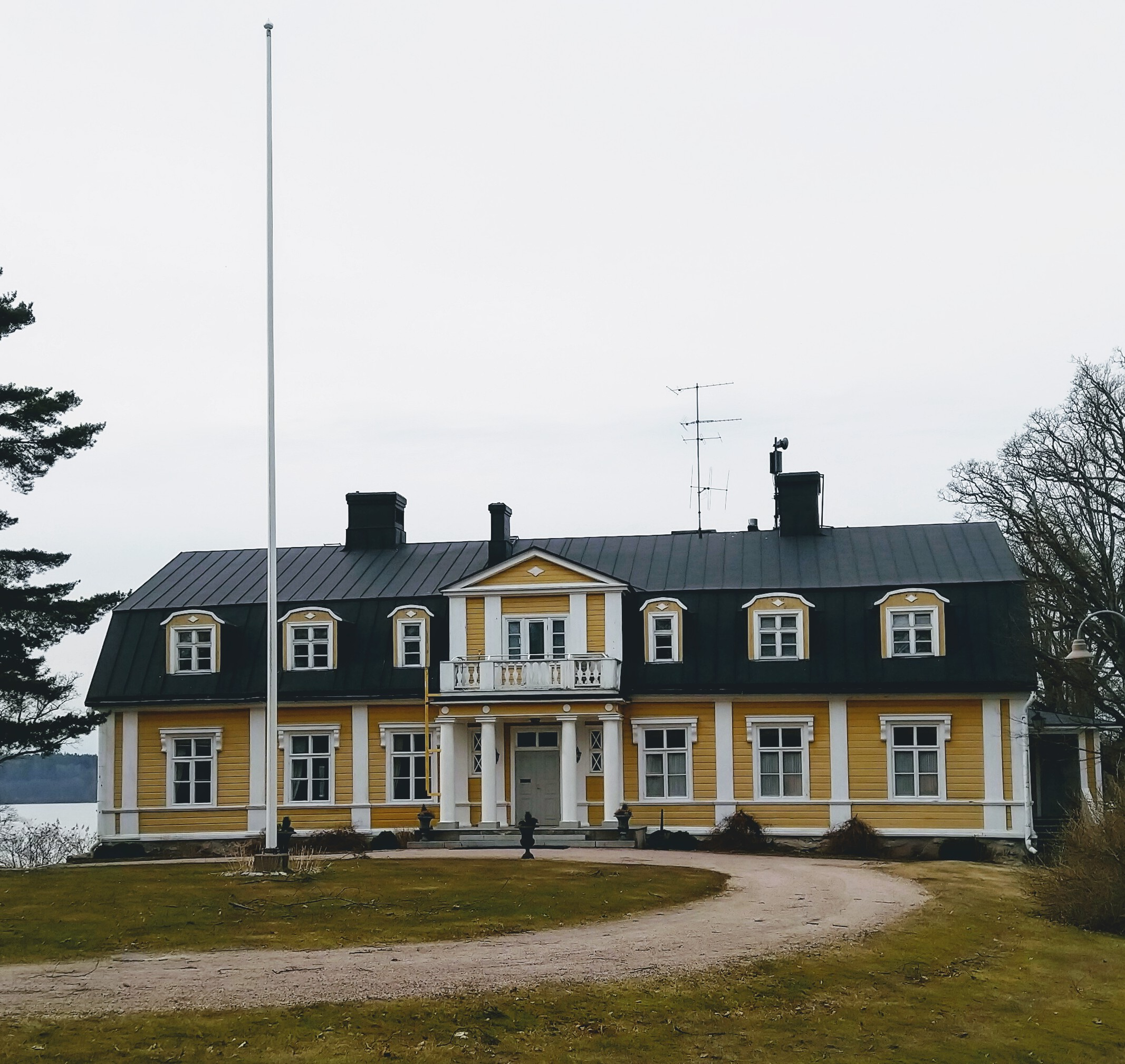 Bodom gård i Esbo